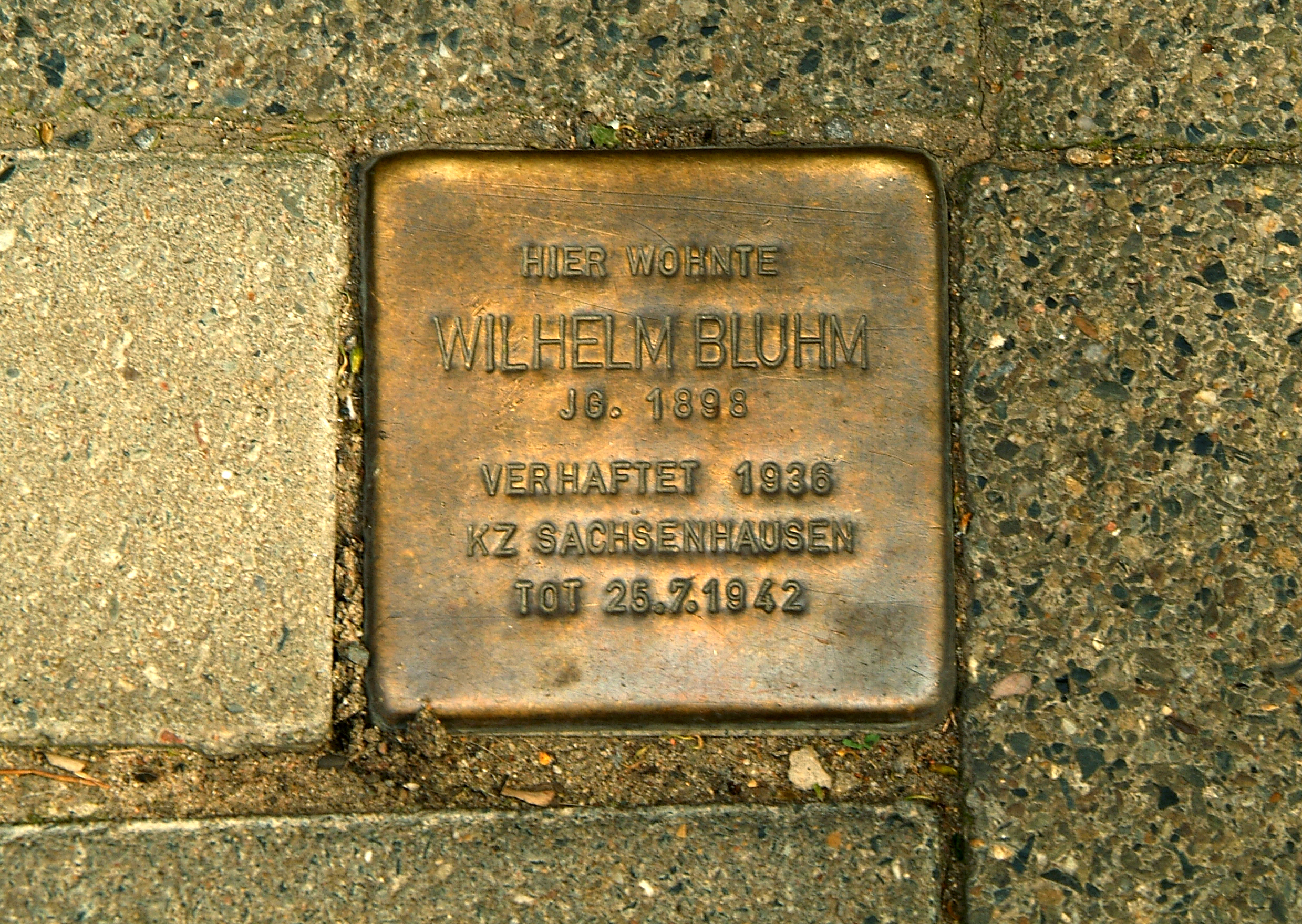 Im Haus Nedderfeldstraße 8/Ecke Elisenstraße wohnte Wilhelm Bluhm in der zweiten Etage rechts. Ein Stolperstein vor dem Gebäude erinnert an den 1942 im KZ Sachsenhausen Ermordeten.